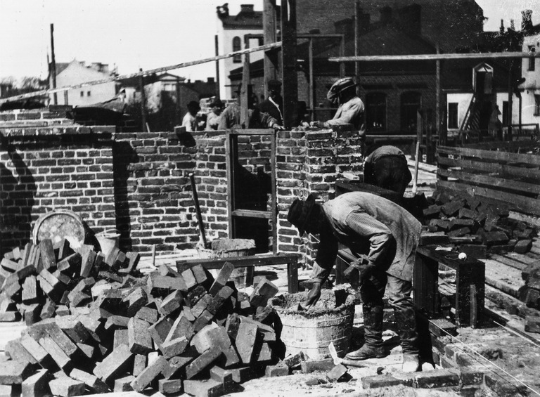 Talonrakennus- ja muuraustöitä Meritullikadulla Helsingissä.